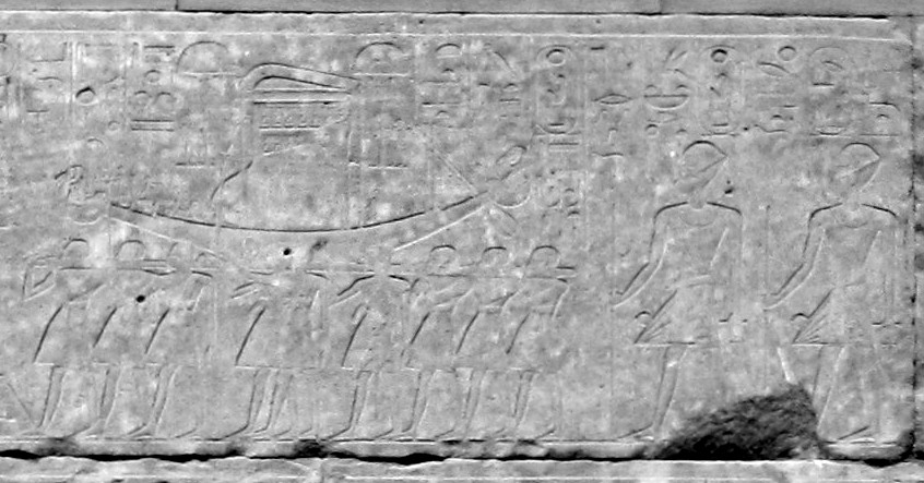 Darstellung in der Roten Kapelle, Barkenprozession der Amun-Barke während des Opet-Fests, dahinter Hatschepsut und Thutmosis III.